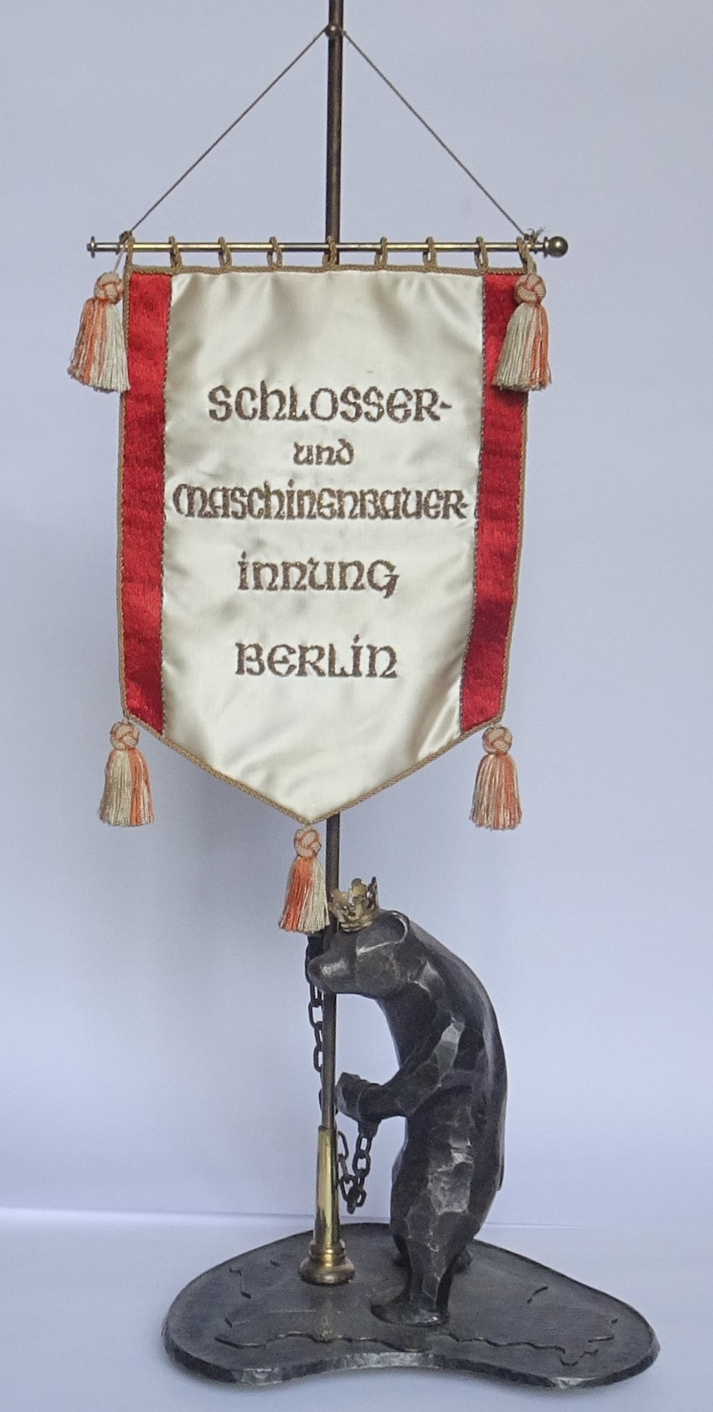 Tischwimpel der Schlosser- und Maschinenbauerinnung in Berlin